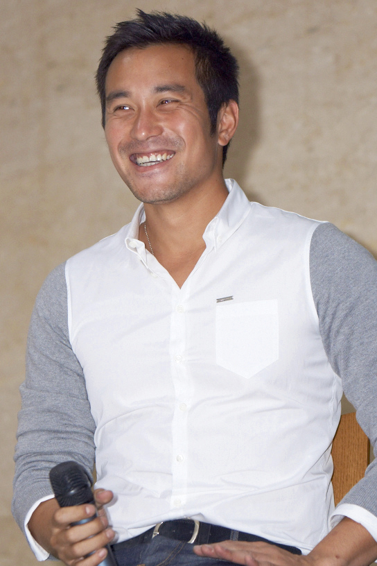 電影演員張孝全